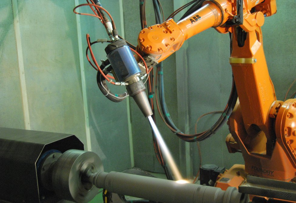 С помощью оборудования GTV HVOF-k2 наносится антикоррозионное покрытие в центре функциональных покрытия ЗАО "Плакарт" в г. Щербинка.